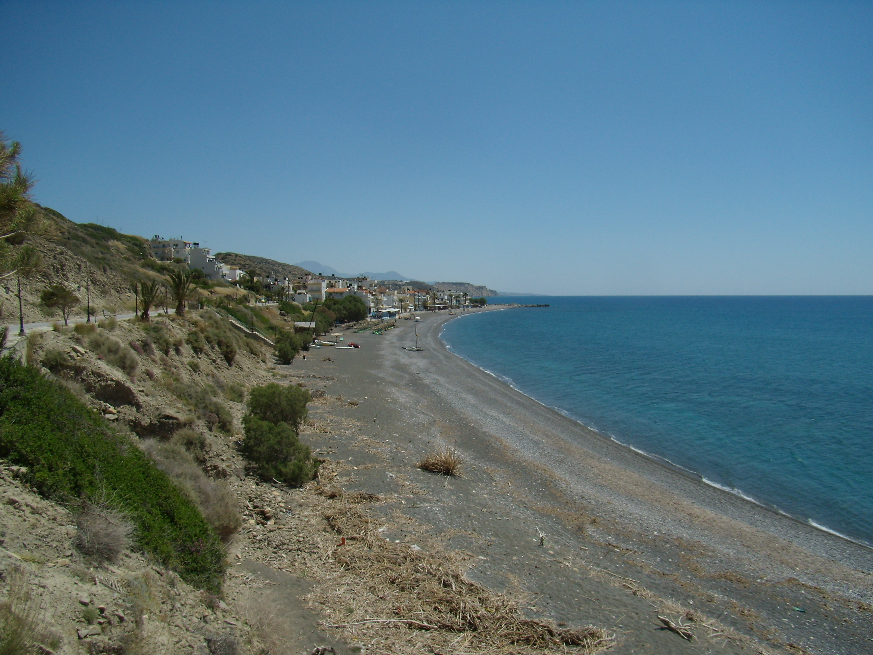 Mirtos